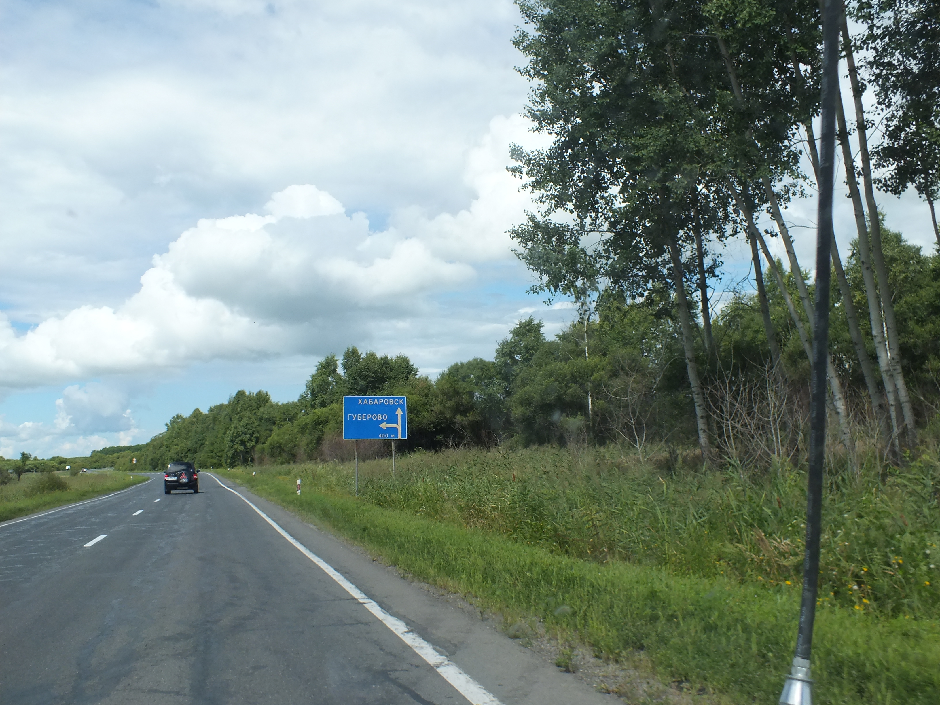 Автодорога Уссури, перекрёсток на Губерово.